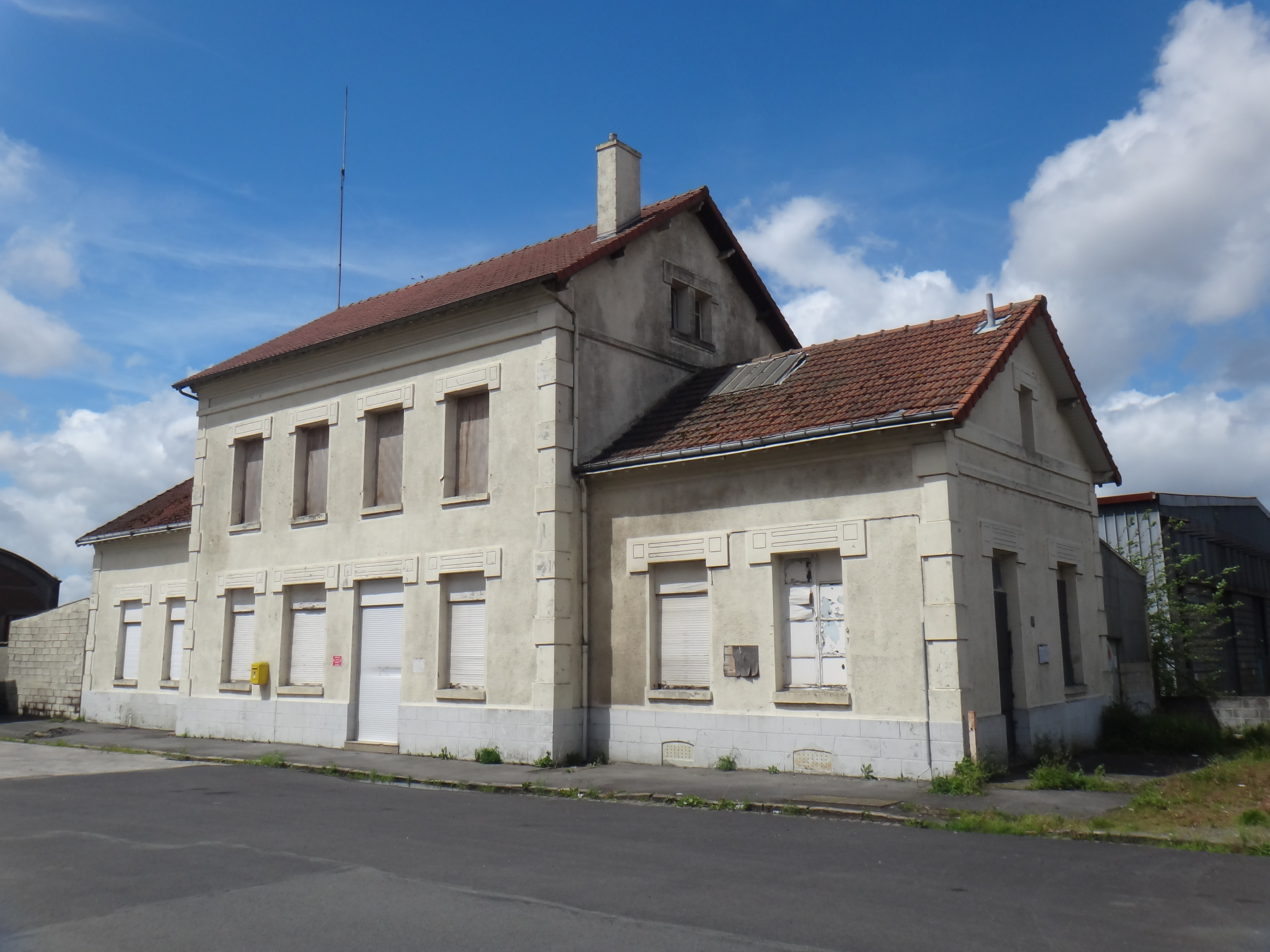 Ancienne gare de Bapaume, Pas-de-Calais, France, en mai 2014.